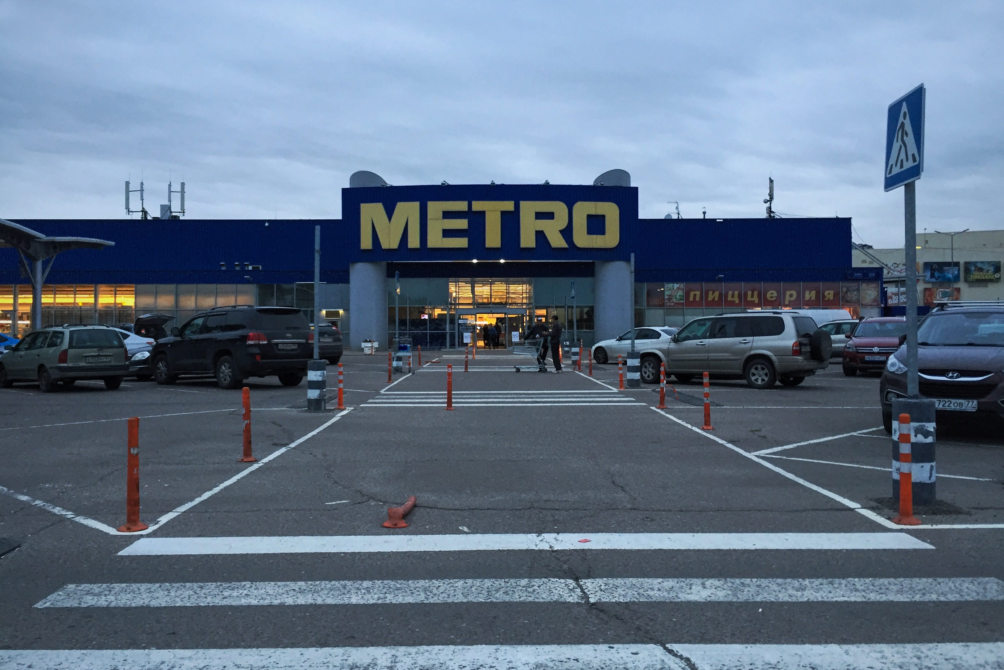 Проспект Мира. Гипермаркет Metro